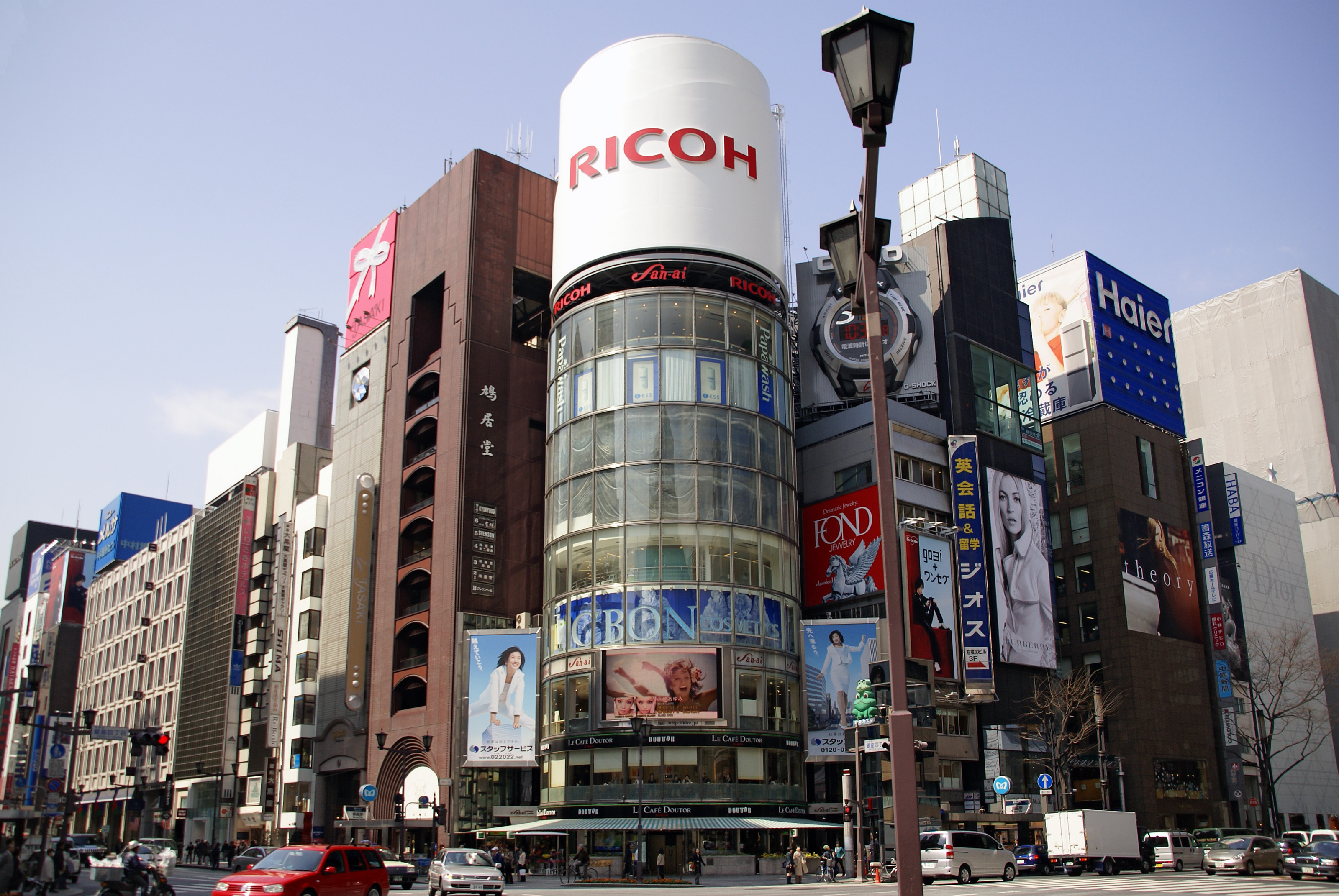 Mitsui Main Building in Chuo-ku, Tokyo, Japan